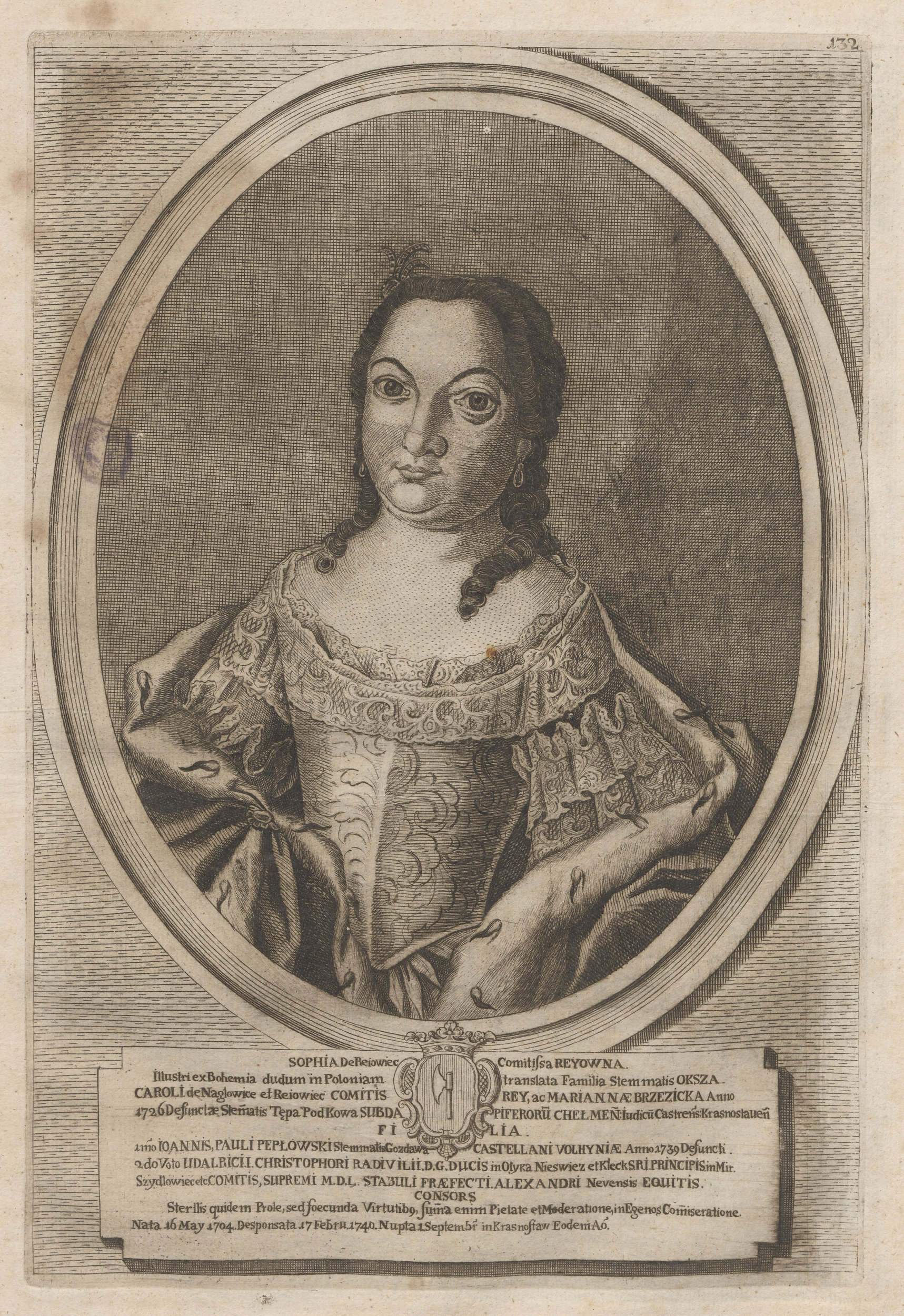 Партрэт Соф'і з Рэяў, жонкі Удальрыка Крыштафа РадзівілаБеларуская (тарашкевіца): Партрэт Соф’і Радзівіл (Sofja Radzivił) з Рэяў (Rej)